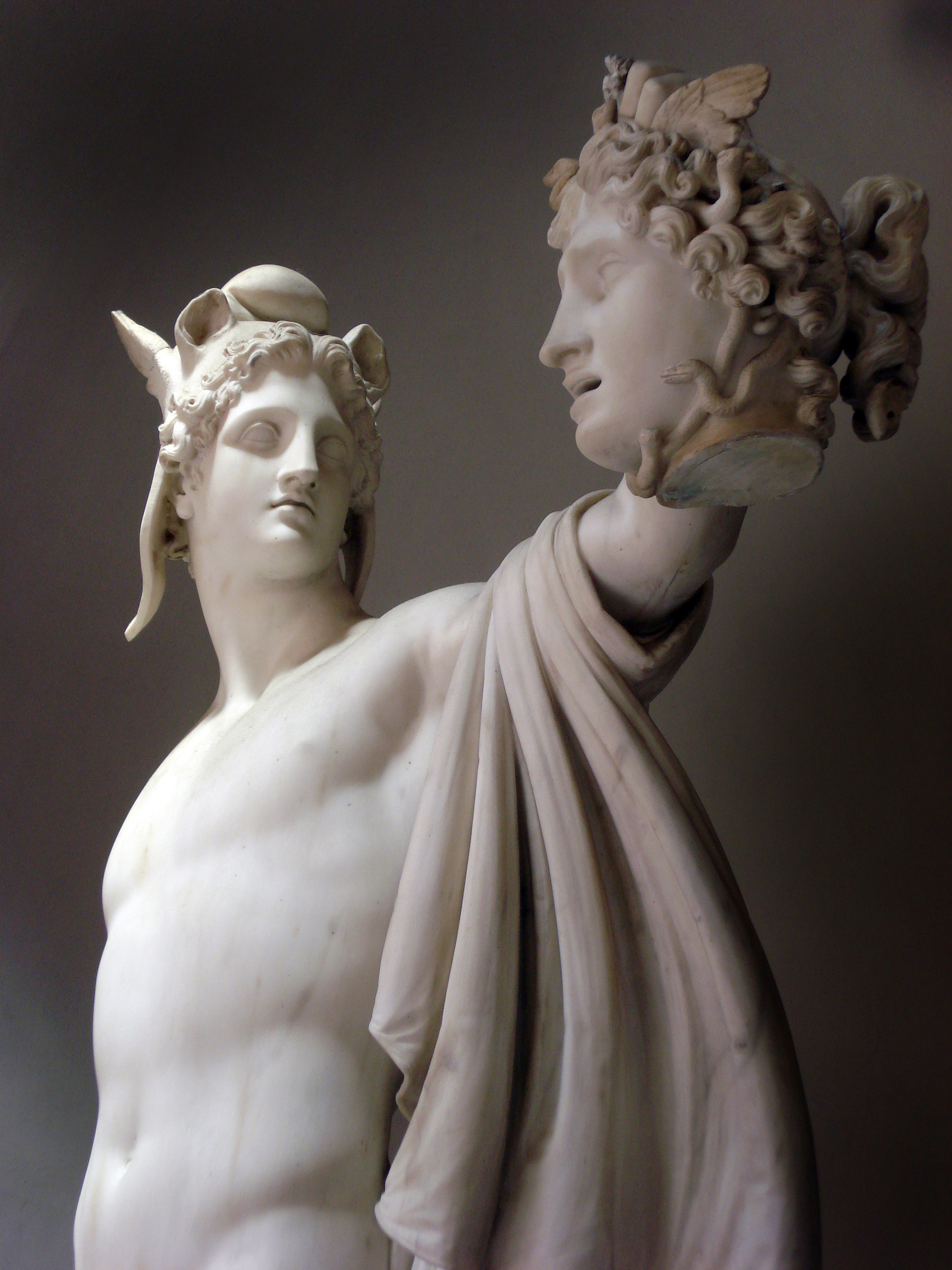 Perseu